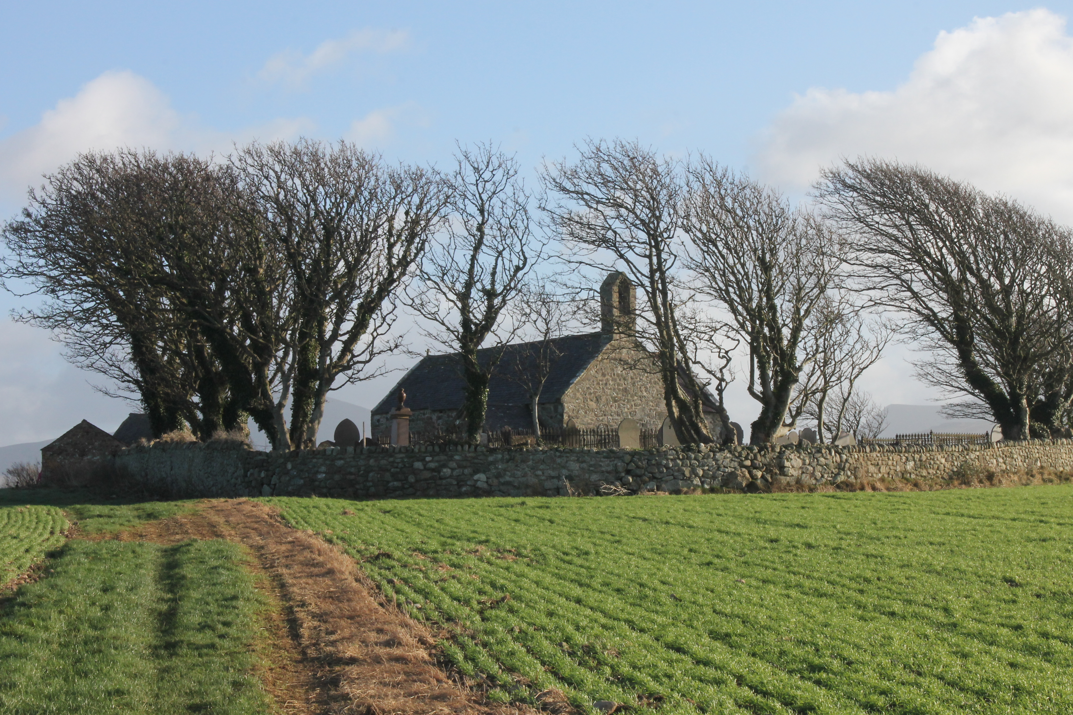 Eglwys Llanfaglan; Sant Baglan, ger caernarfon, Gwynedd.